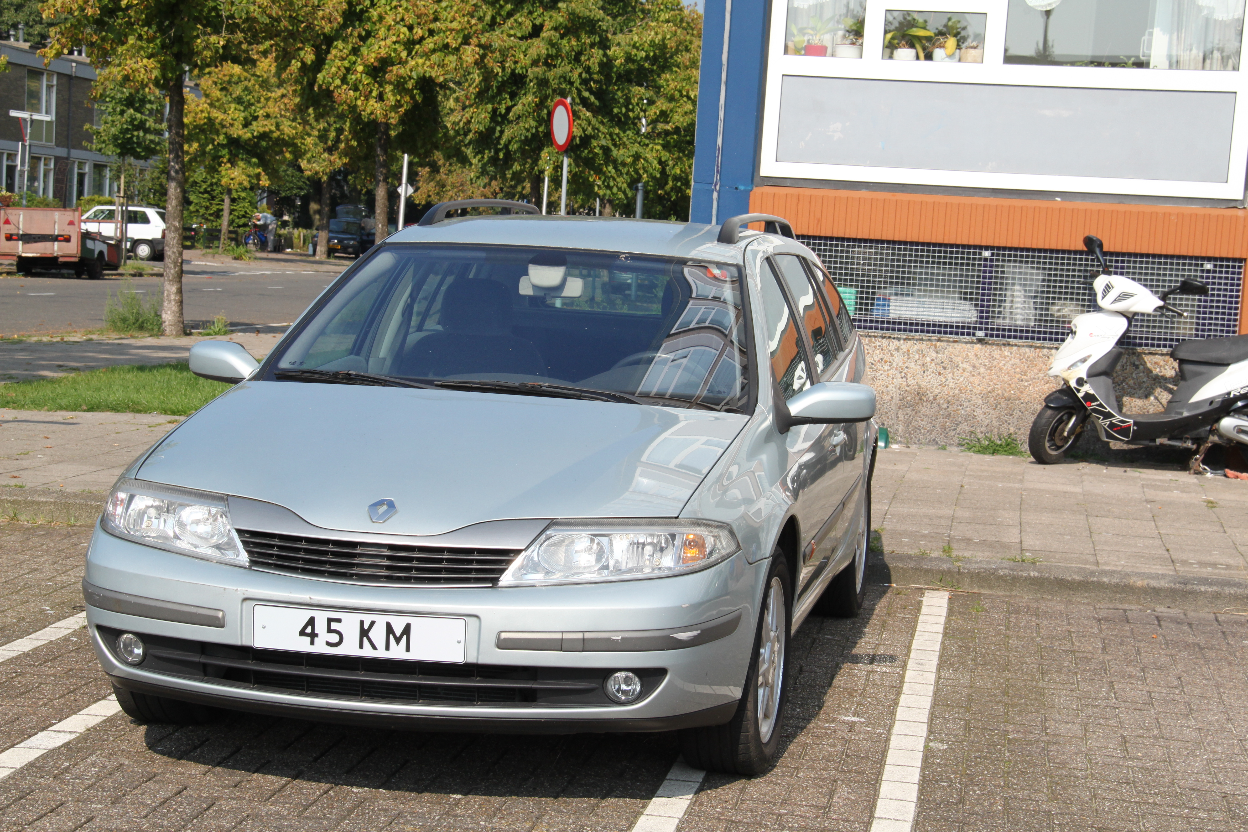 Een Renault Laguna in Utrecht, teruggekeurd tot brommobiel. De achterbank is verwijderd. Er is geen kenteken meer.